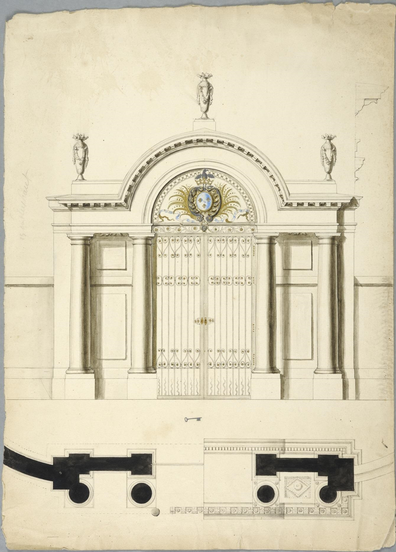 Elévation et plan de la porte d'entrée du château de Saint-Maur, vers 1700-1720. Nationalmuseum, Stockholm, NMH CC 2085.